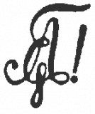 Zirkel der Burschenschaft Arminia Marburg